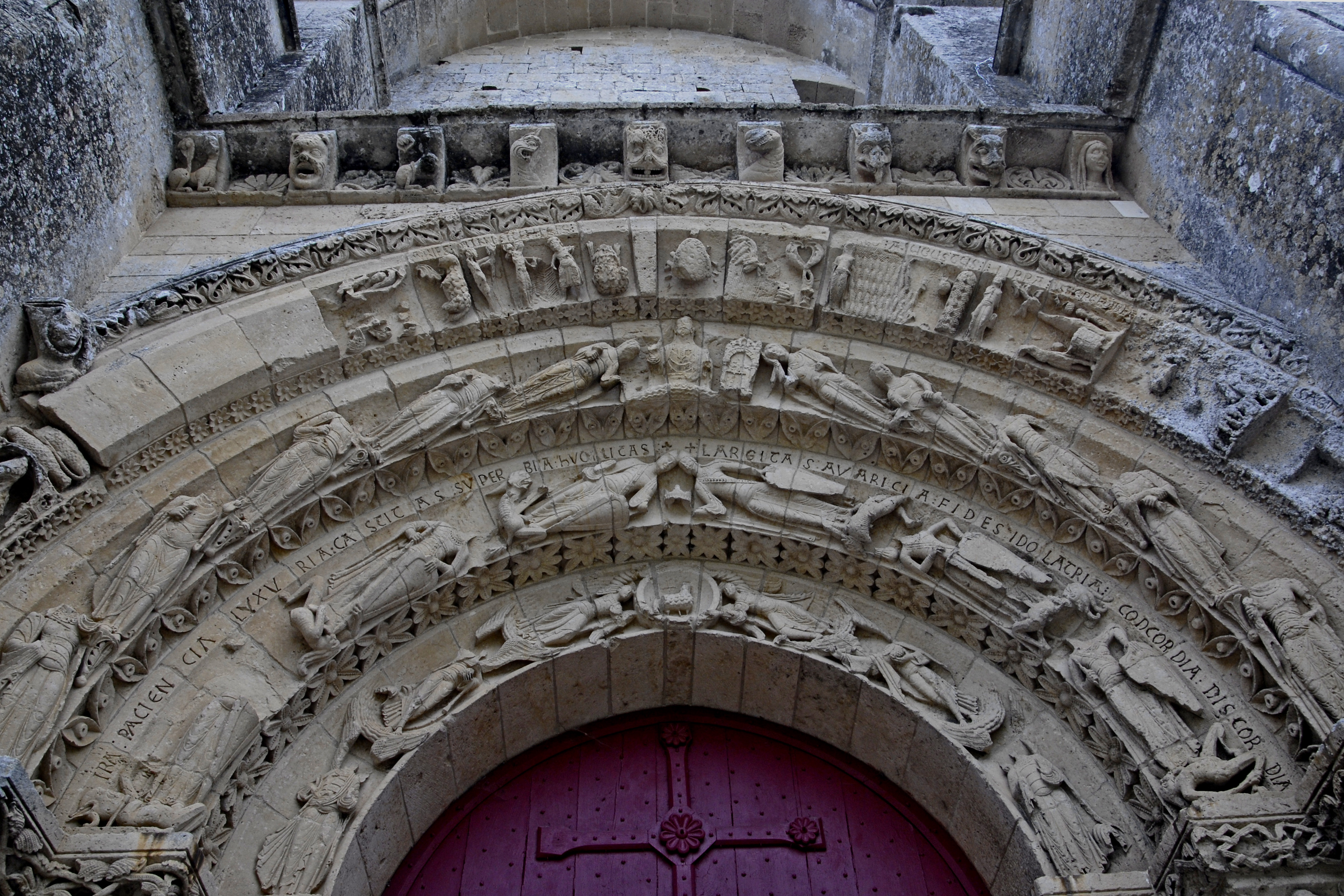 St.-Pierre Aulnay, Archivoltenbögen Hauptportal